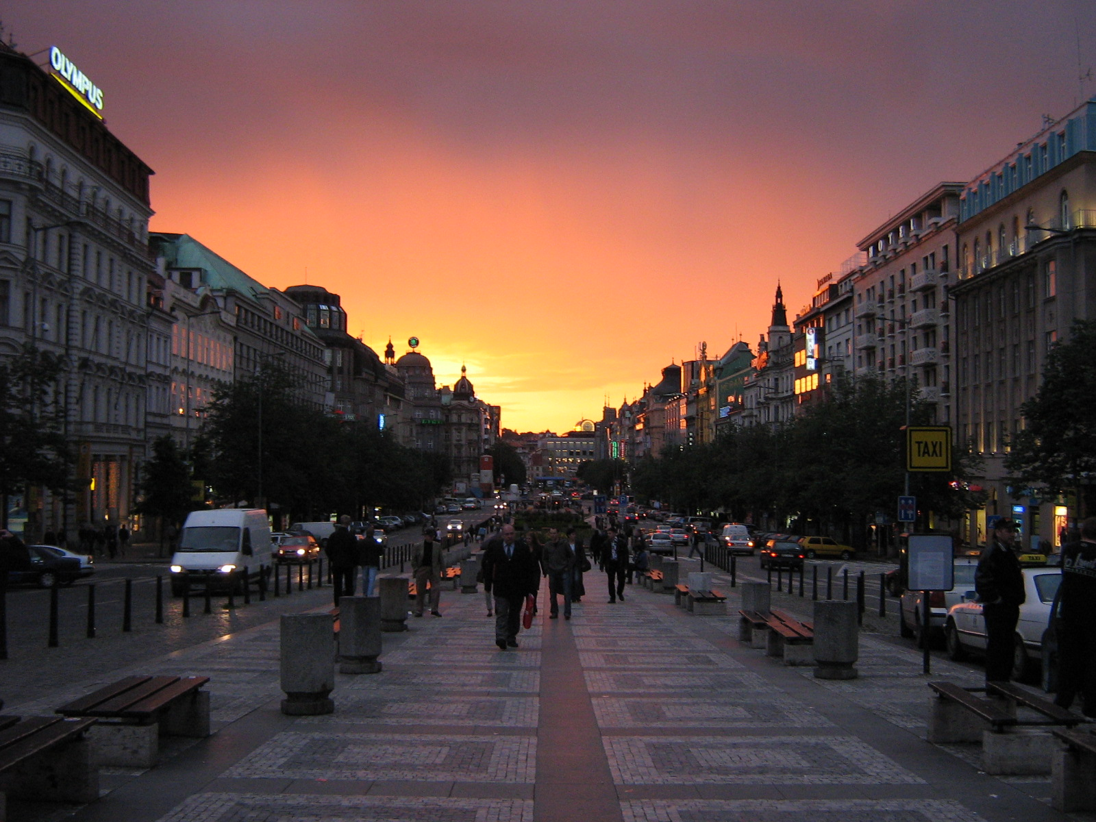 Photo de la place Venceslas à Prague